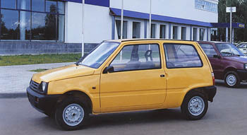 Automobil Oka (Löschen) (Aktuell) 23:15, 8. Mär 2004 . . Dheinrich (Diskussion) . . 350 x 191 (21480 Byte) (Automobil Oka)